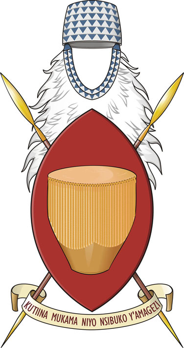 Wappen Bunyoro